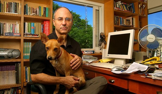 מיכאל גורביץ' - בימוי ומשחק